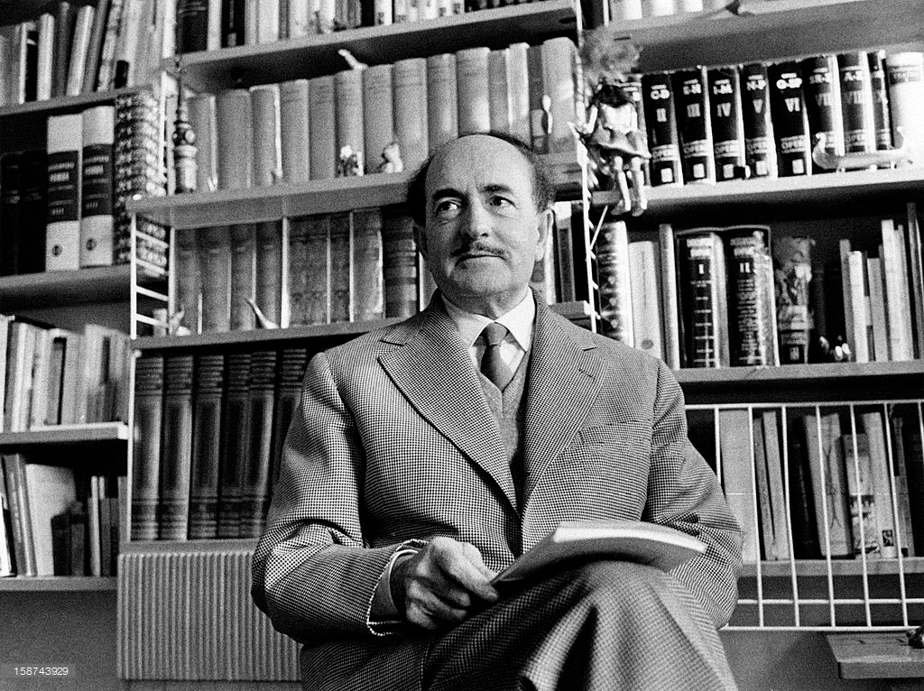 Salvatore Quasimodo in Milan, Italy